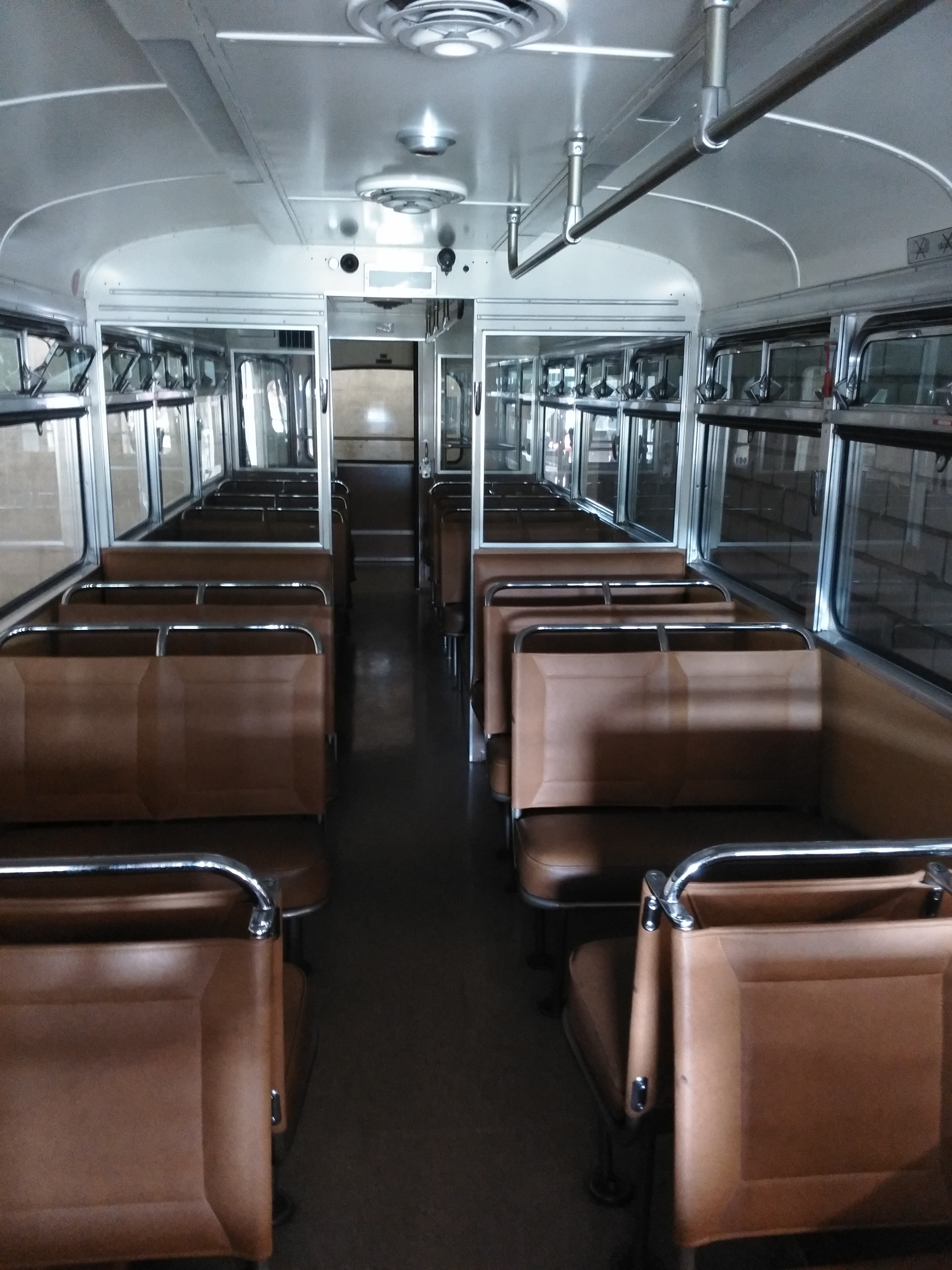 APE 4 80 Personenanhänger ZVB Fahrgastraum